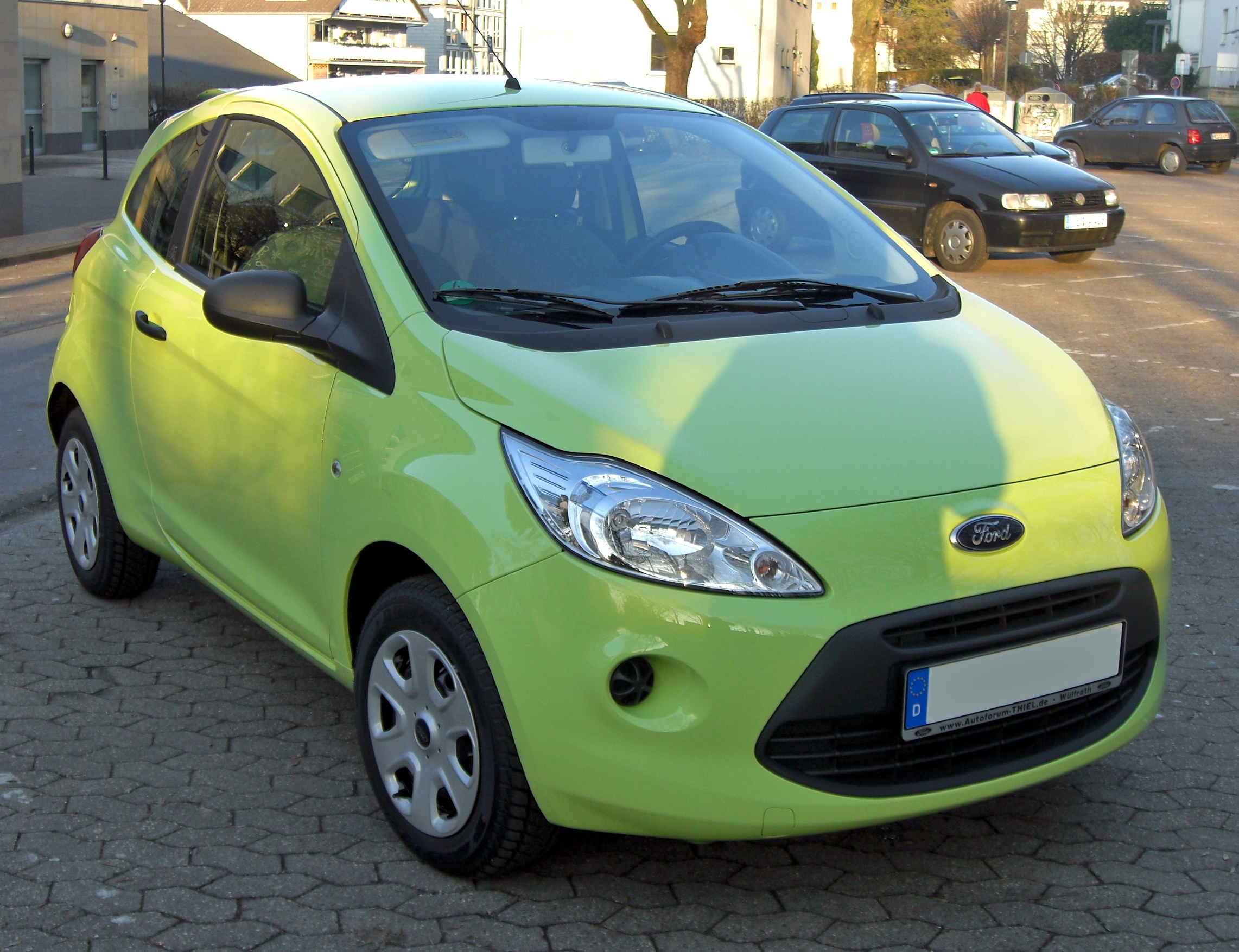 Ford Ka II